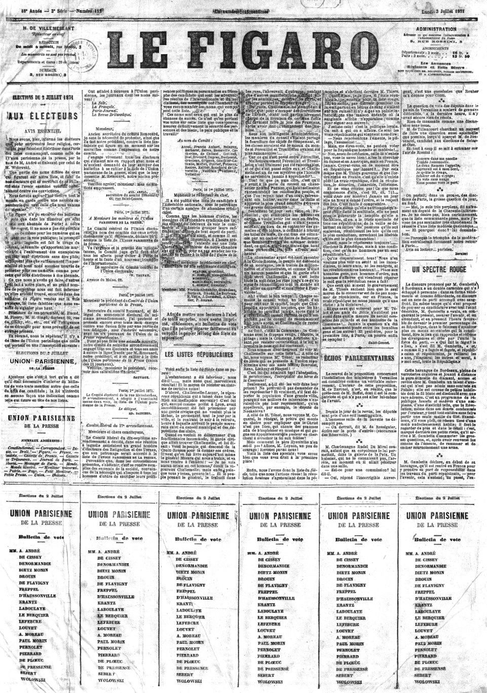 "Une" du Figaro en date du lundi 3 juillet 1871 (publié le dimanche 2 juillet).